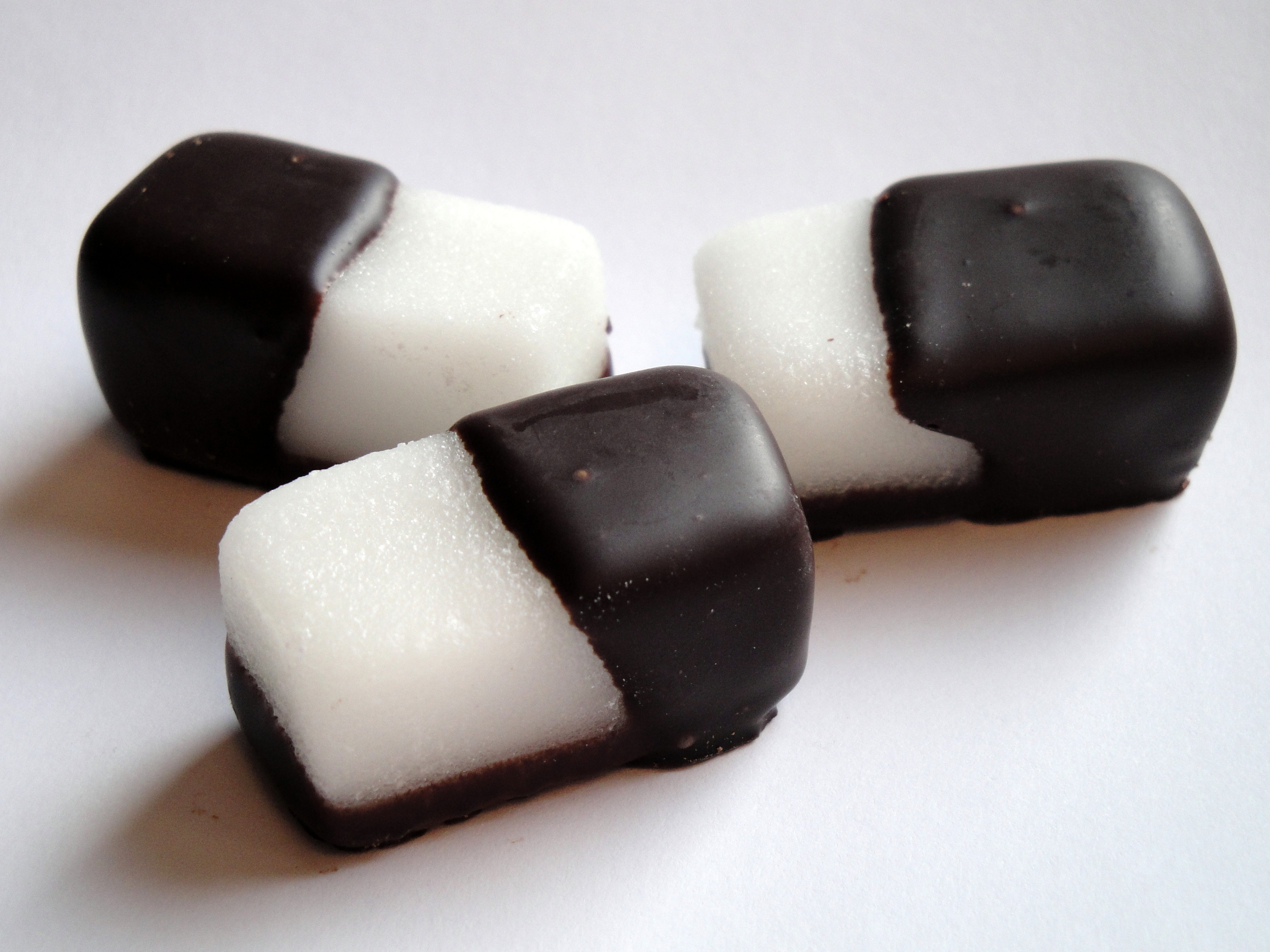 Bremer Kluten von Lühders (Stelle)